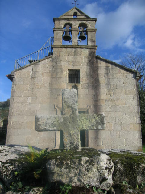 Igrexa de Santa Comba de Bértola